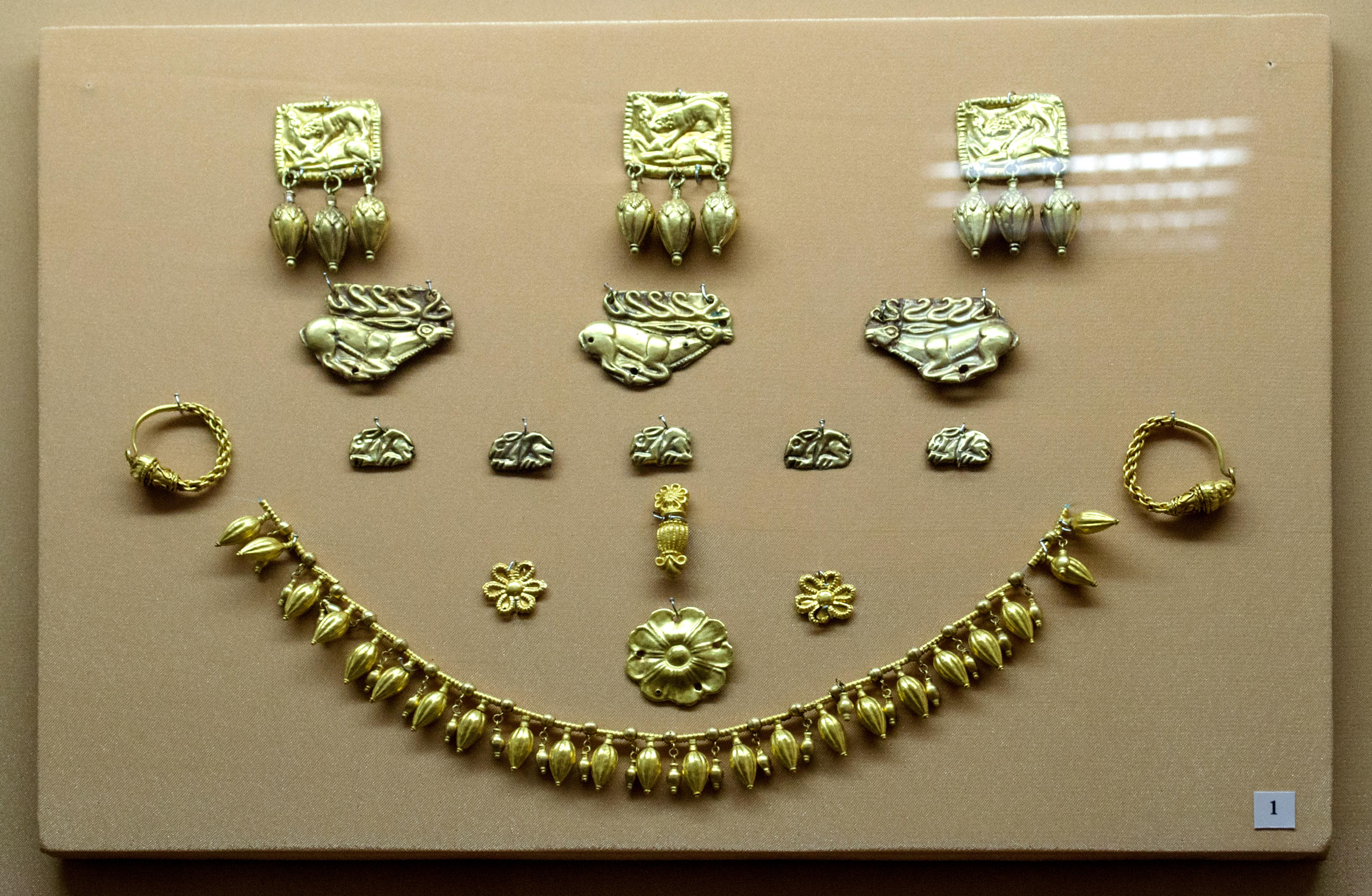 Експозиція Національного музею історії України